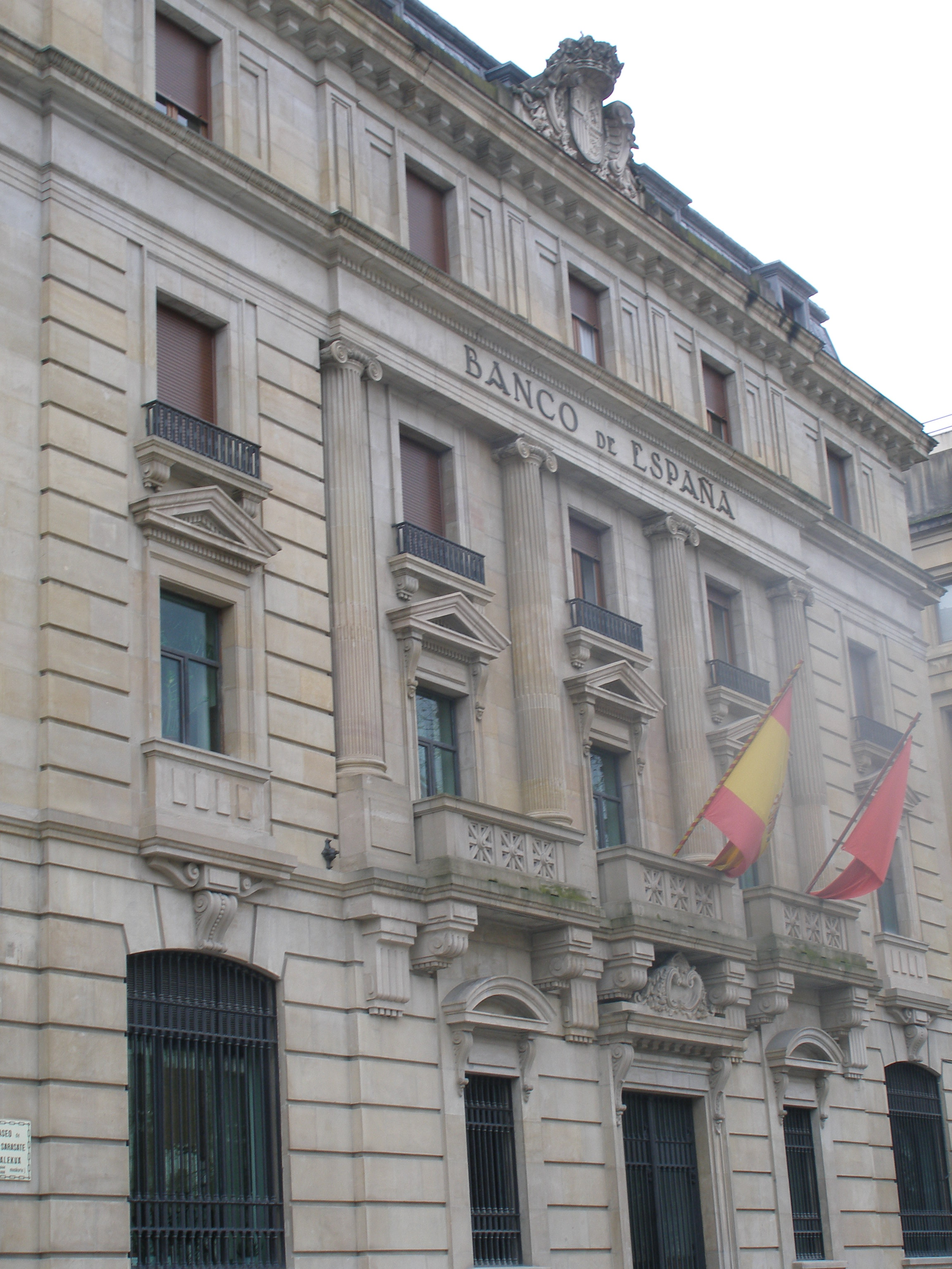 Españako Bankua eraikina, Iruñan